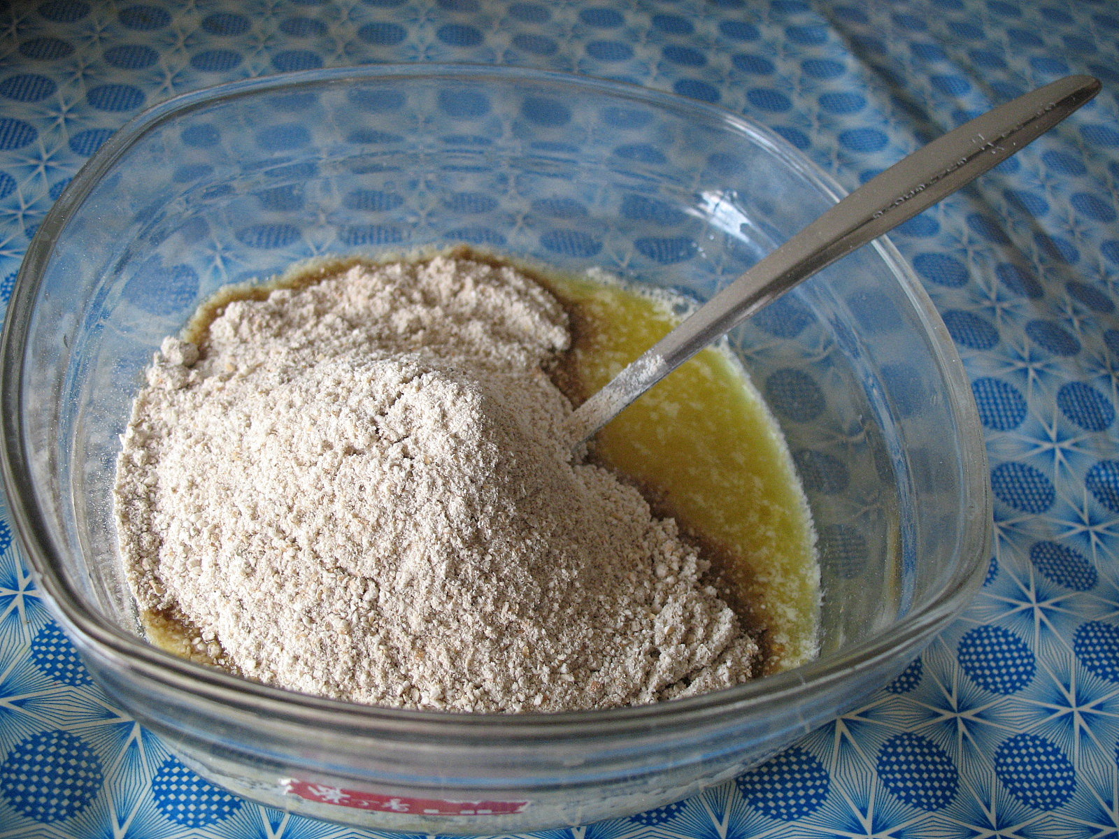 糌粑製作照